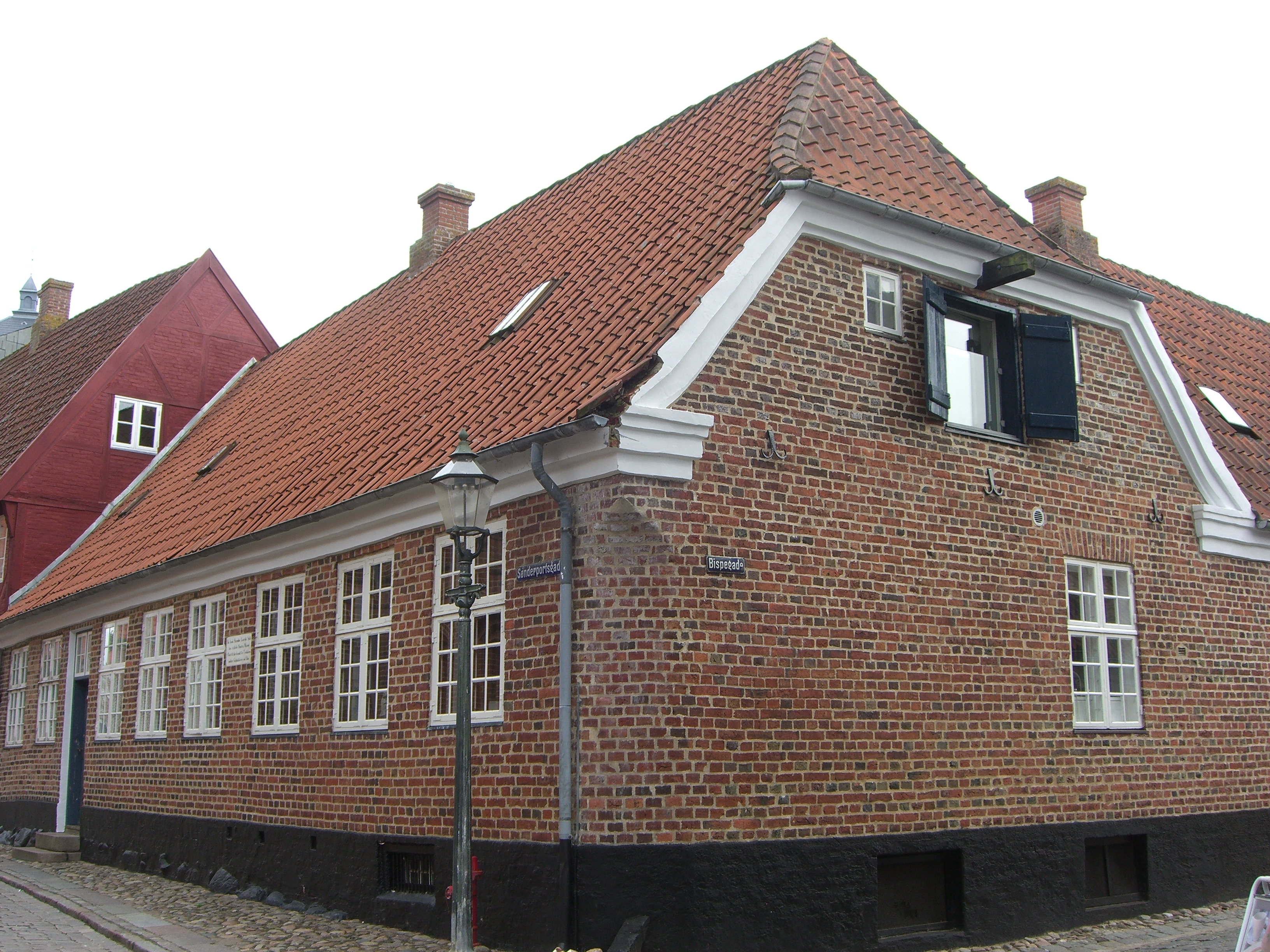 Maren Spliids Hus, Ribe